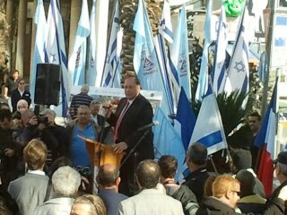 The inauguration ceremony renovation Paris Square in Haifa, presence Bertrand Delanoë mayor of Paris Yona Yahav Mayor of Haifa טקס חנוכת כיכר פריז בעיר התחתית בחיפה. הכיכר שופצה במימון עיריית פריז. בטקס נכמו ראש עיריית פריז ברטראן דלנואה, יונה יהב ראש עיריית חיפה, חדוה אלמוג סגנית ראש העירייה, הרב של חיפה שאר ישוב כהן, ונכבדים רבים מכל העדות של חיפה והקהל הרחב. יונה יהב